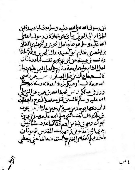 جامع أحكام البخاري لابن جماعة محمد بن إبراهيم بن سعد الشافعي المتوفي 733 هـ صفحة 94 تاريخ نسخ المخطوط: 858 هـ، مكتبة تشستربيتي بإيرلندا